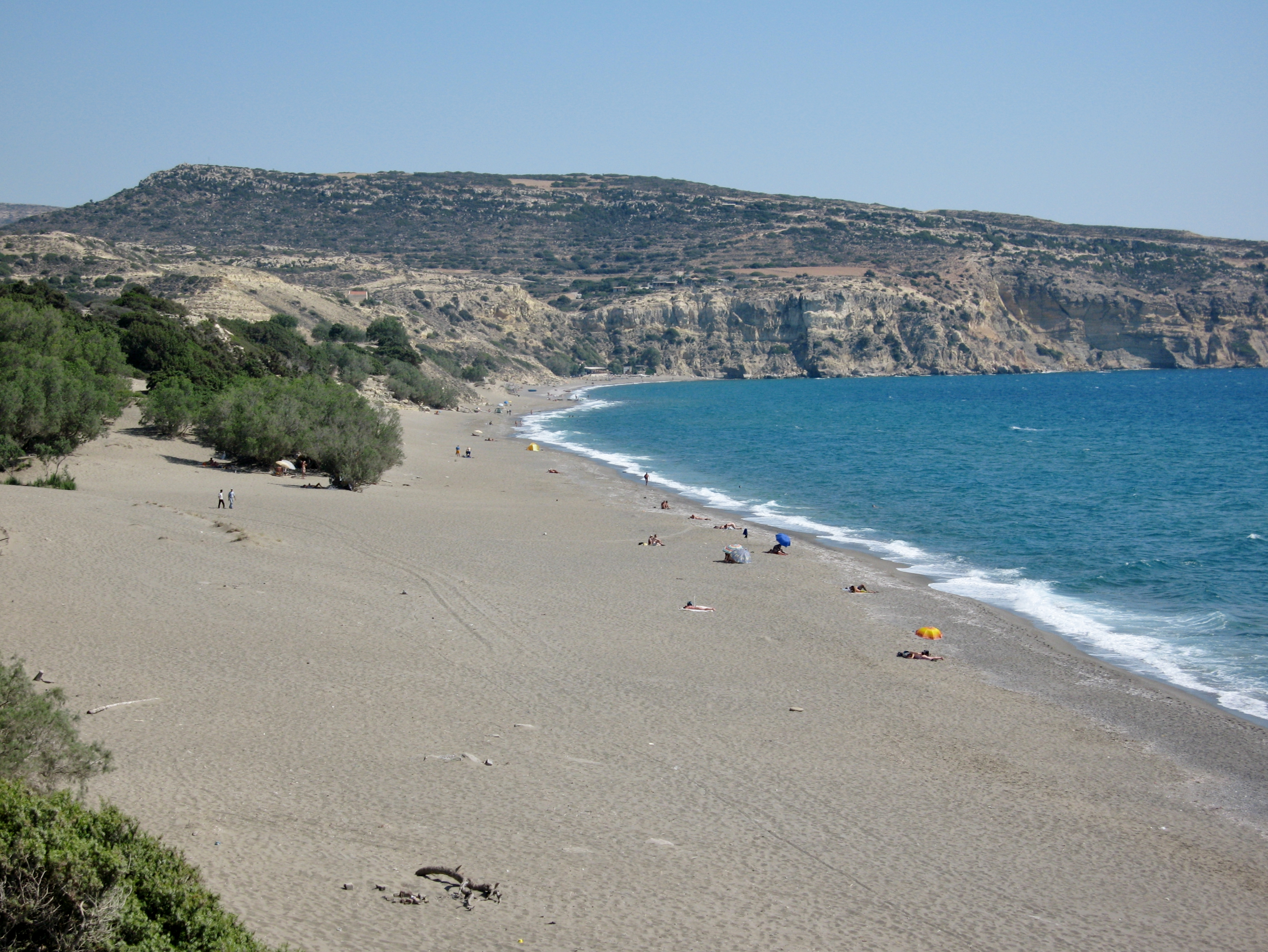 Komos, Nomos Iraklio, Crete, Greece